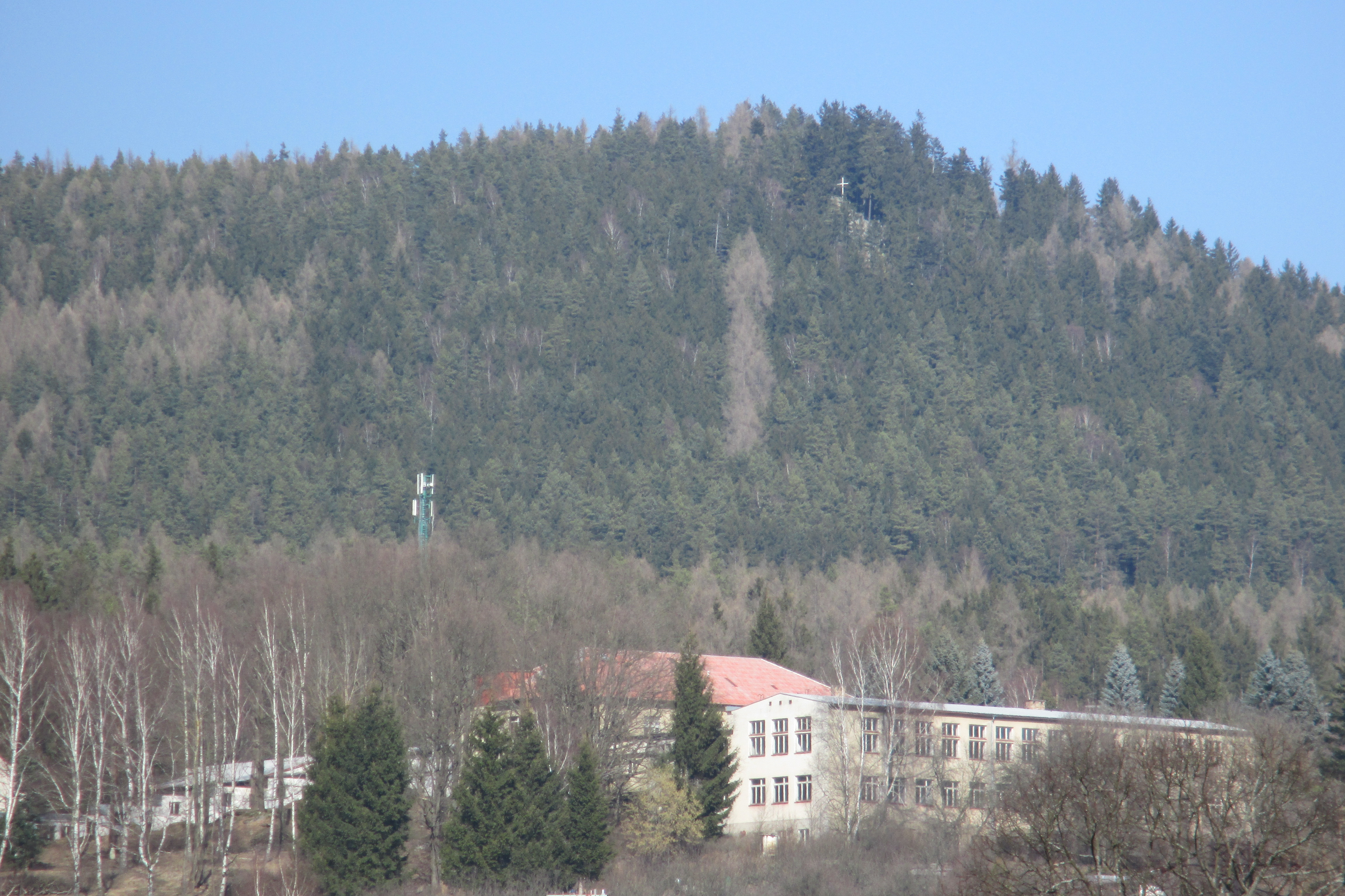 Kraví hora u Vyššího Brodu (pohled z vyšebrodského kláštera).